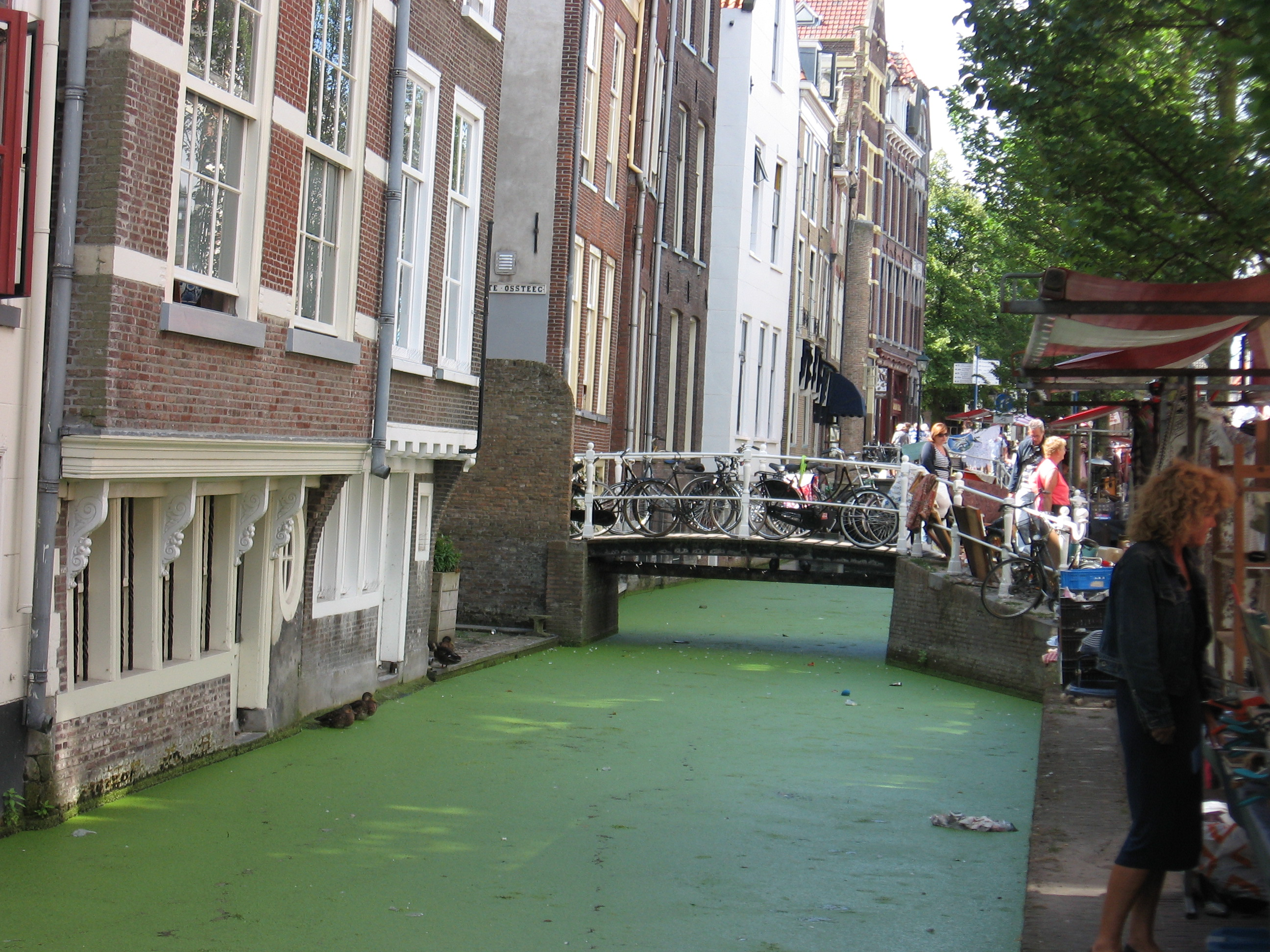 Delft - voetgangersbrug Bonte Ossteeg (Voldersgracht).jpg